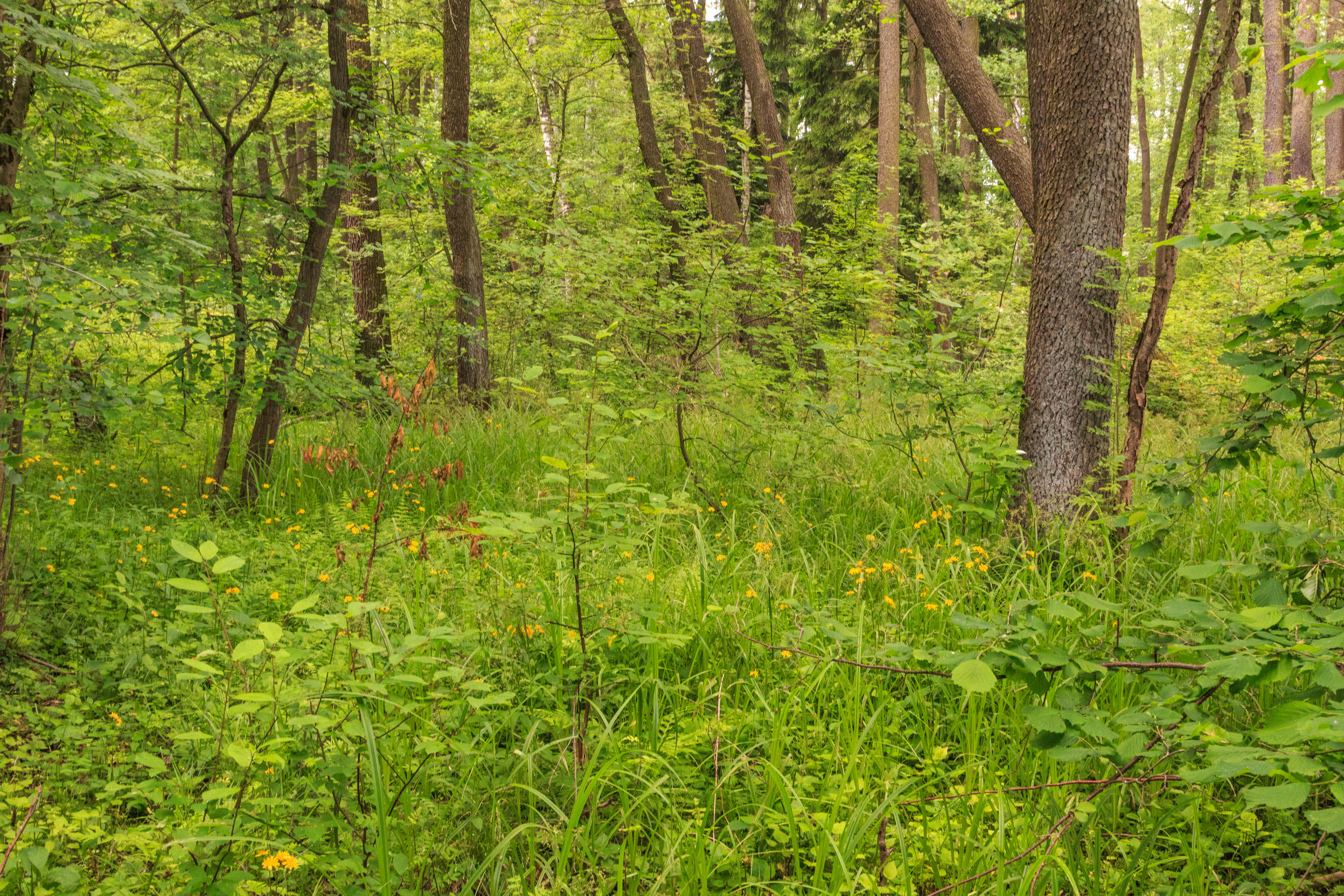 PP Na bahně Project: Chráněná území.